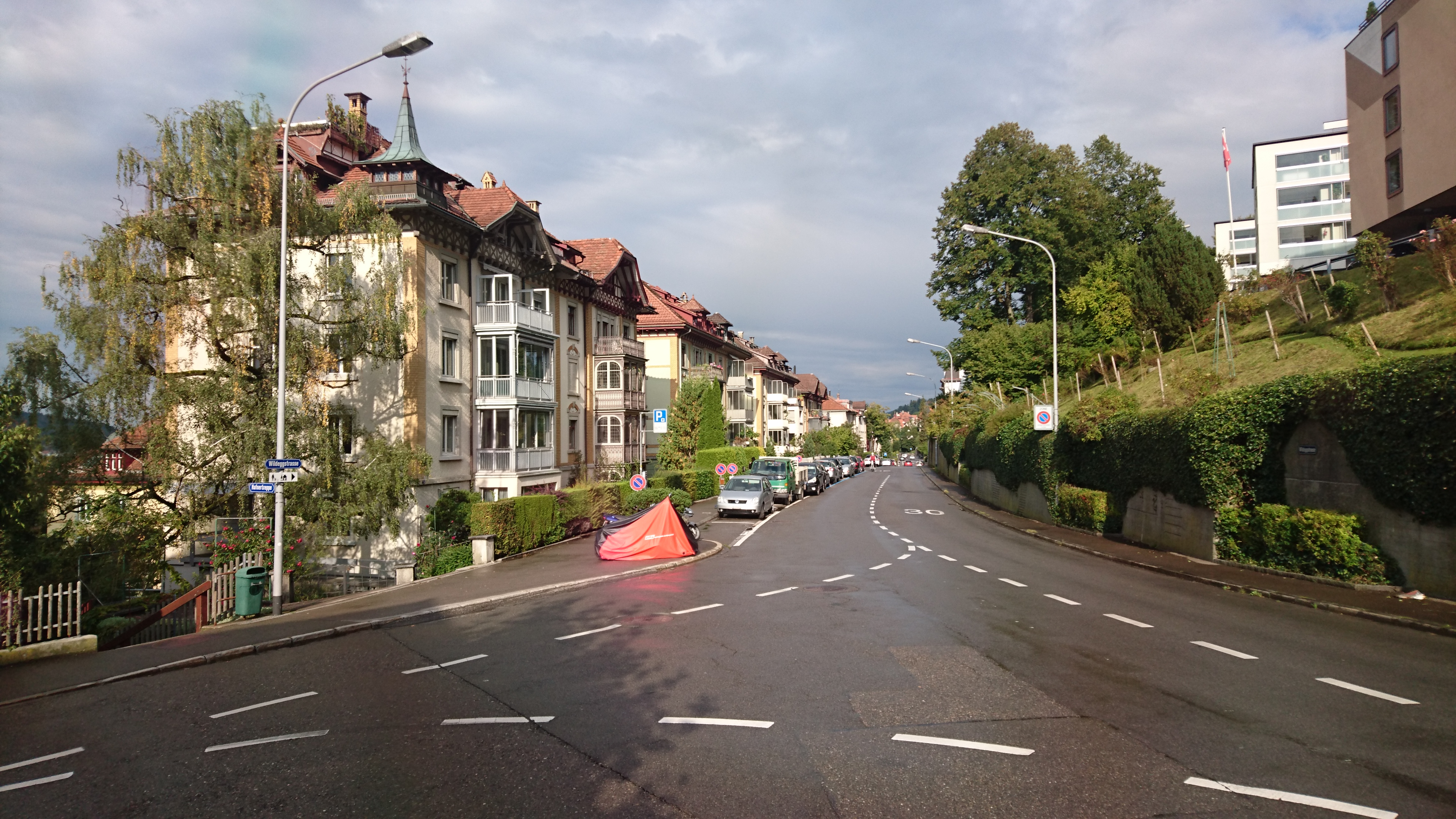 Blick von Westen in die Wildeggstrasse, Südostquartier, St. Gallen